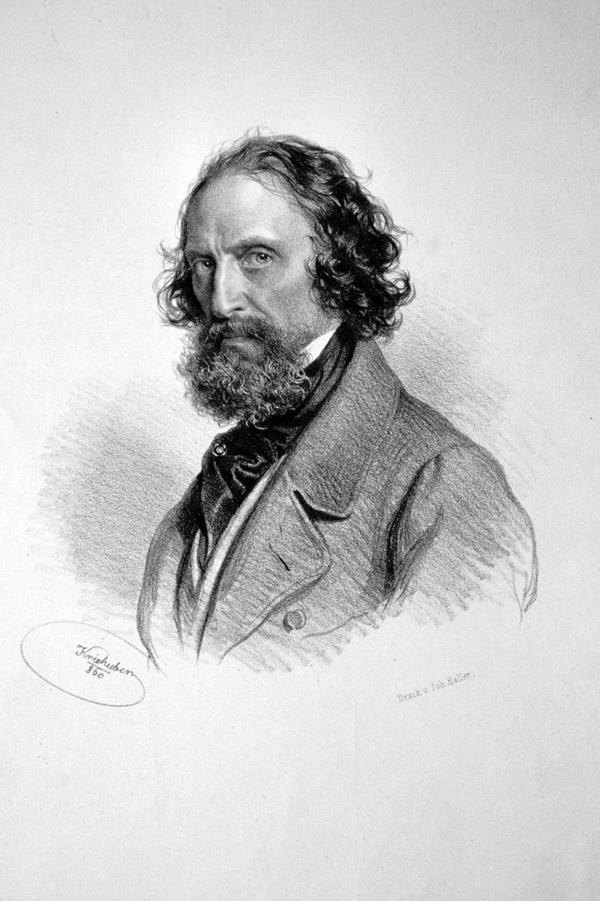 Self-portrait